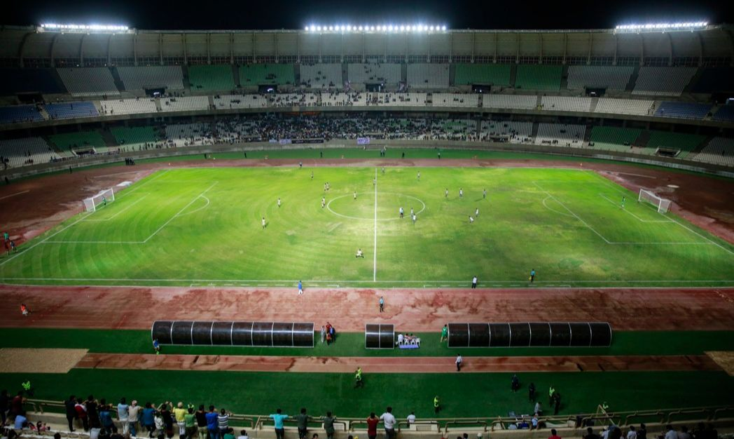 ورزشگاه پارس، شیراز، مرداد ۱۳۹۷